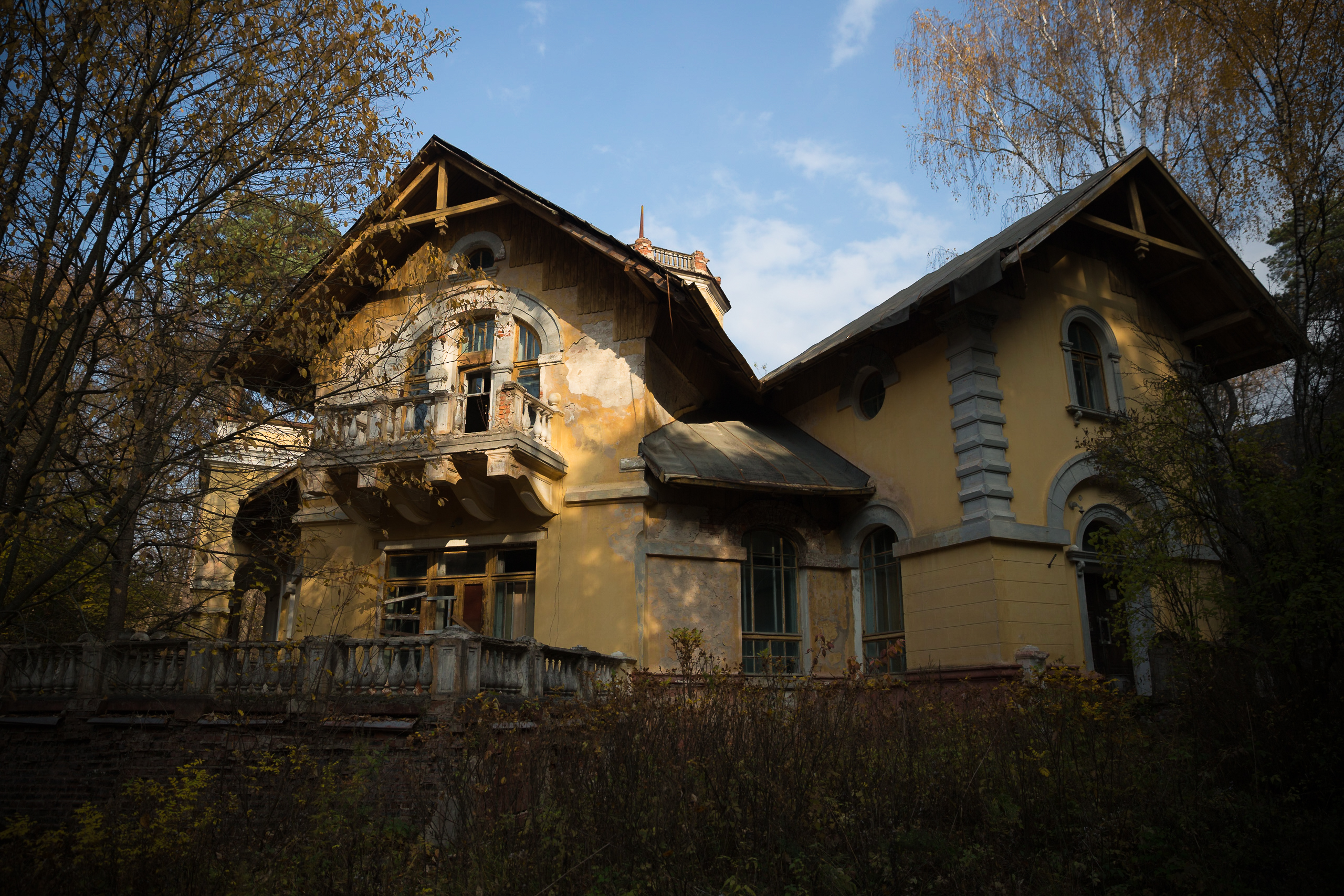 Усадьба Обнинских «Турлики» («Морозовская дача») (Калужская область, Обнинск, Ул. Пирогова, 2 км к З от ст. Обнинское)